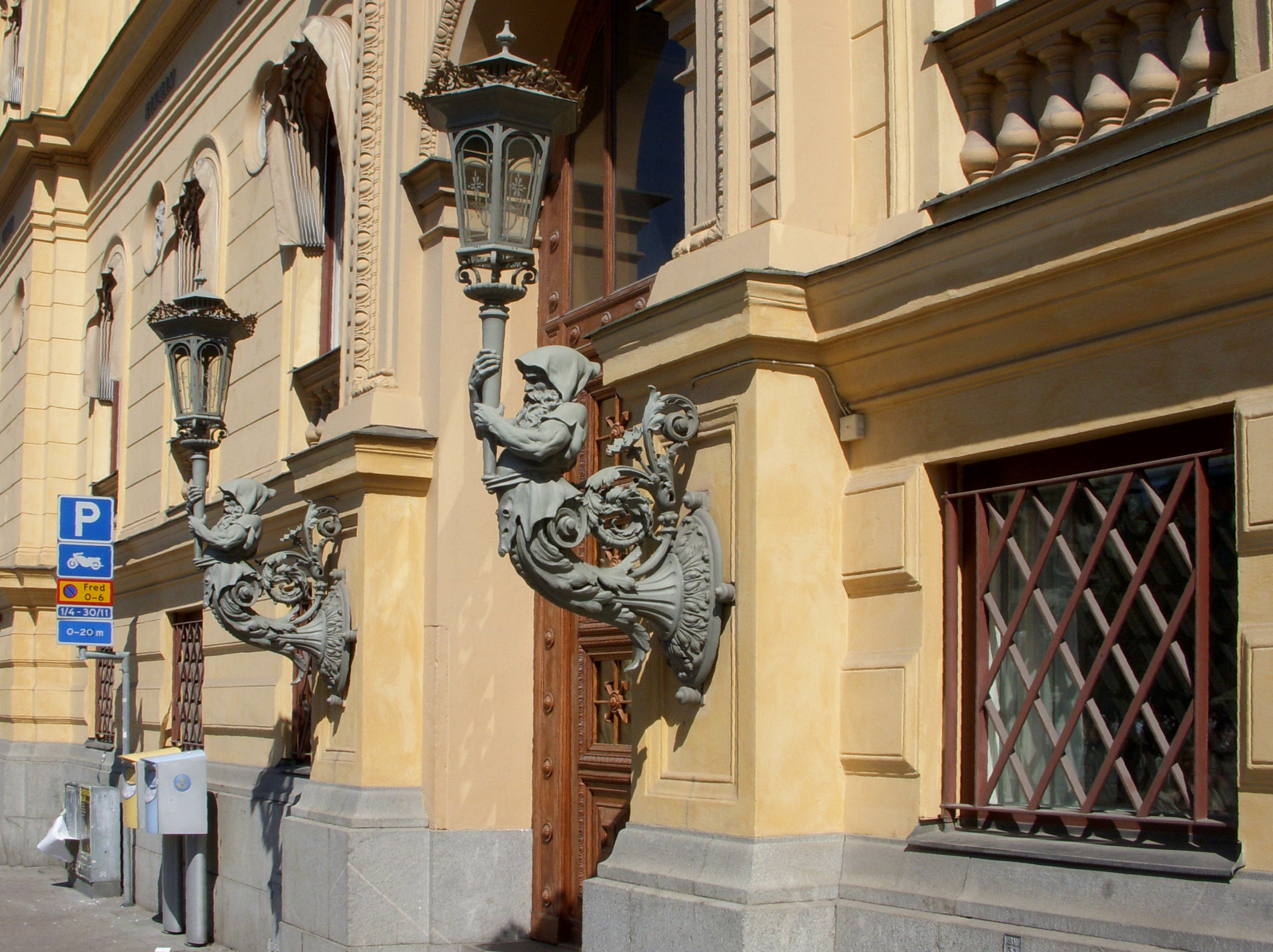 Gamla Jernkontorets hus på Norrmalm i Stockholm, entré